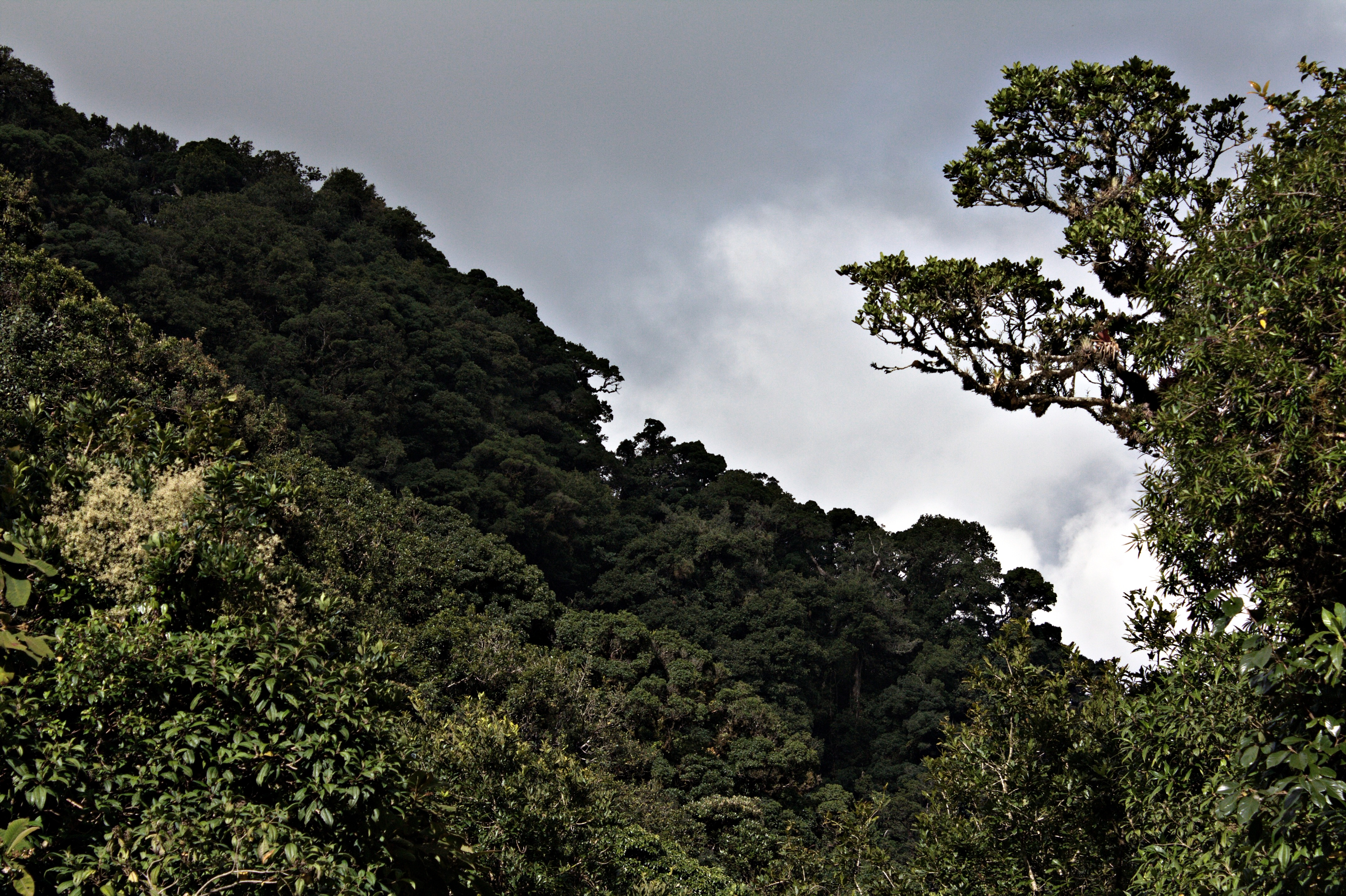 Panorama desde Rancho Quemado, punto que se encuentra aproximadamente a 2,150 mtsnm, en el Parque Nacional La Tigra.